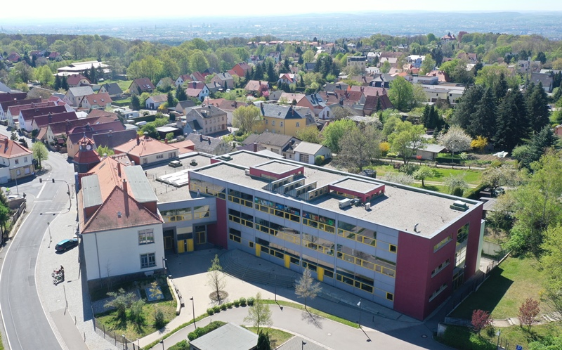 Luftbild der Kurfürst-Moritz-Schule 2019